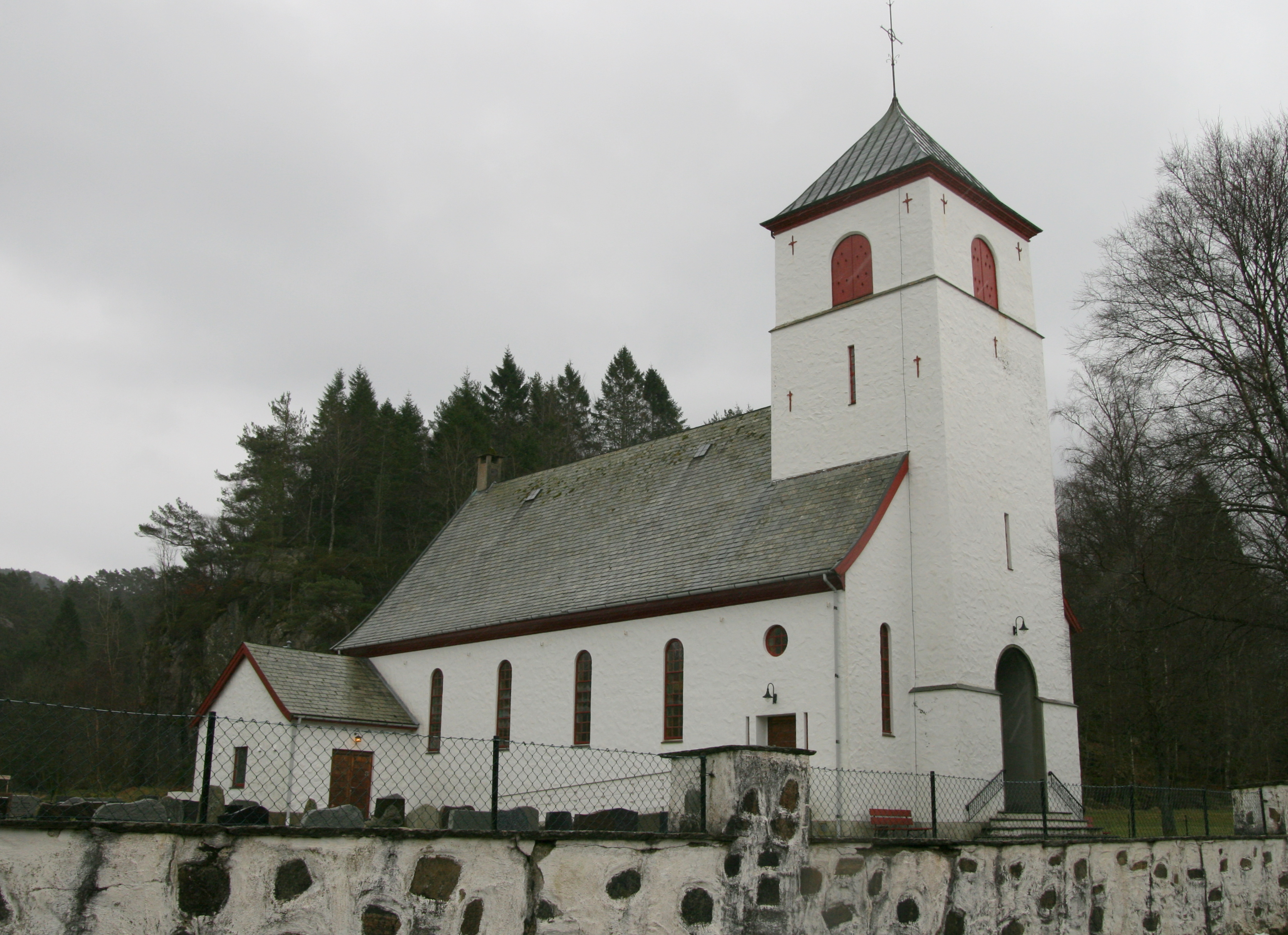 Førde kirke